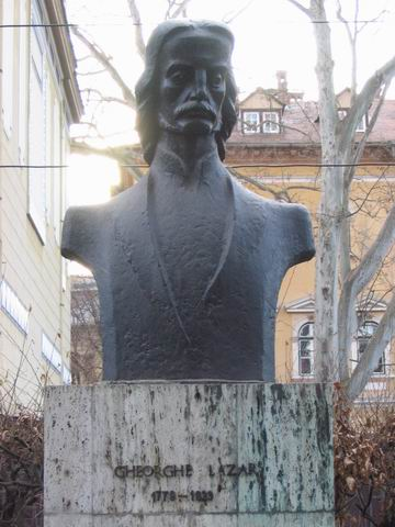 Made by me, december 2005